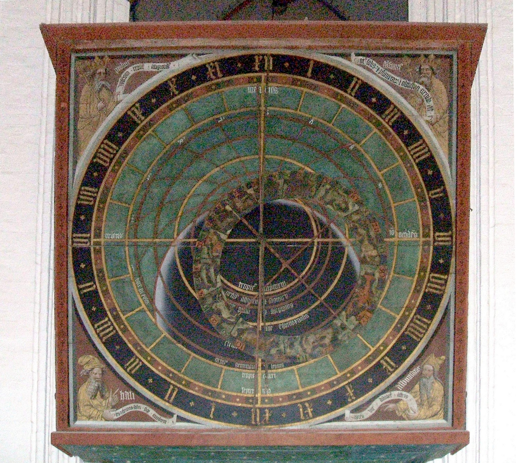 Astronomische Uhr in der Stralsunder Nikolaikirche